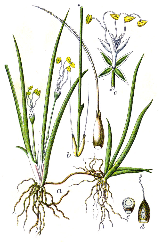 Littorella uniflora (L.) Asch., syn. Littorella lacustris L. [nom. illeg.] Original Caption Litorelle, Litorella lacustris